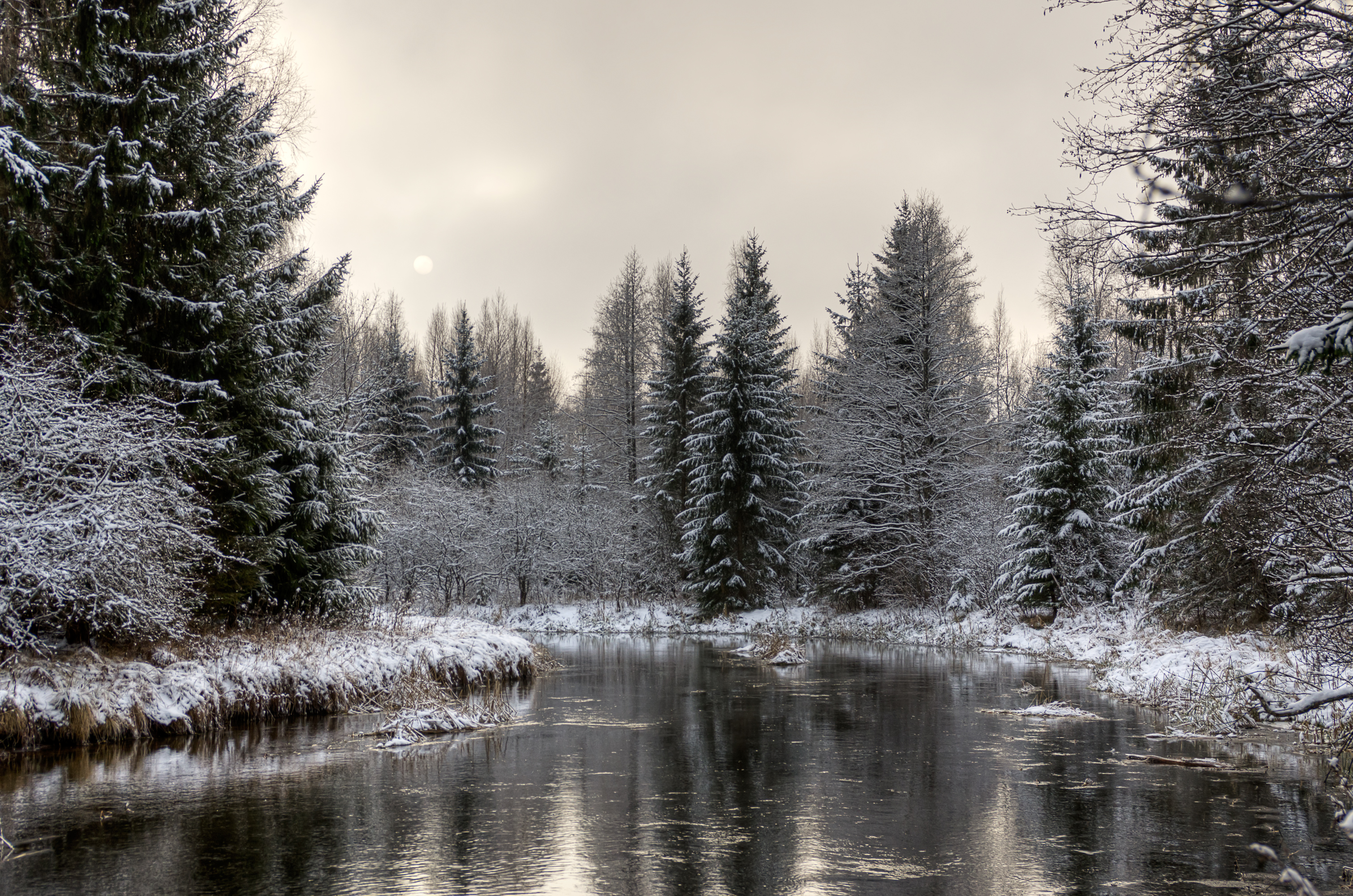 Põltsamaa jõgi Endla looduskaitsealal